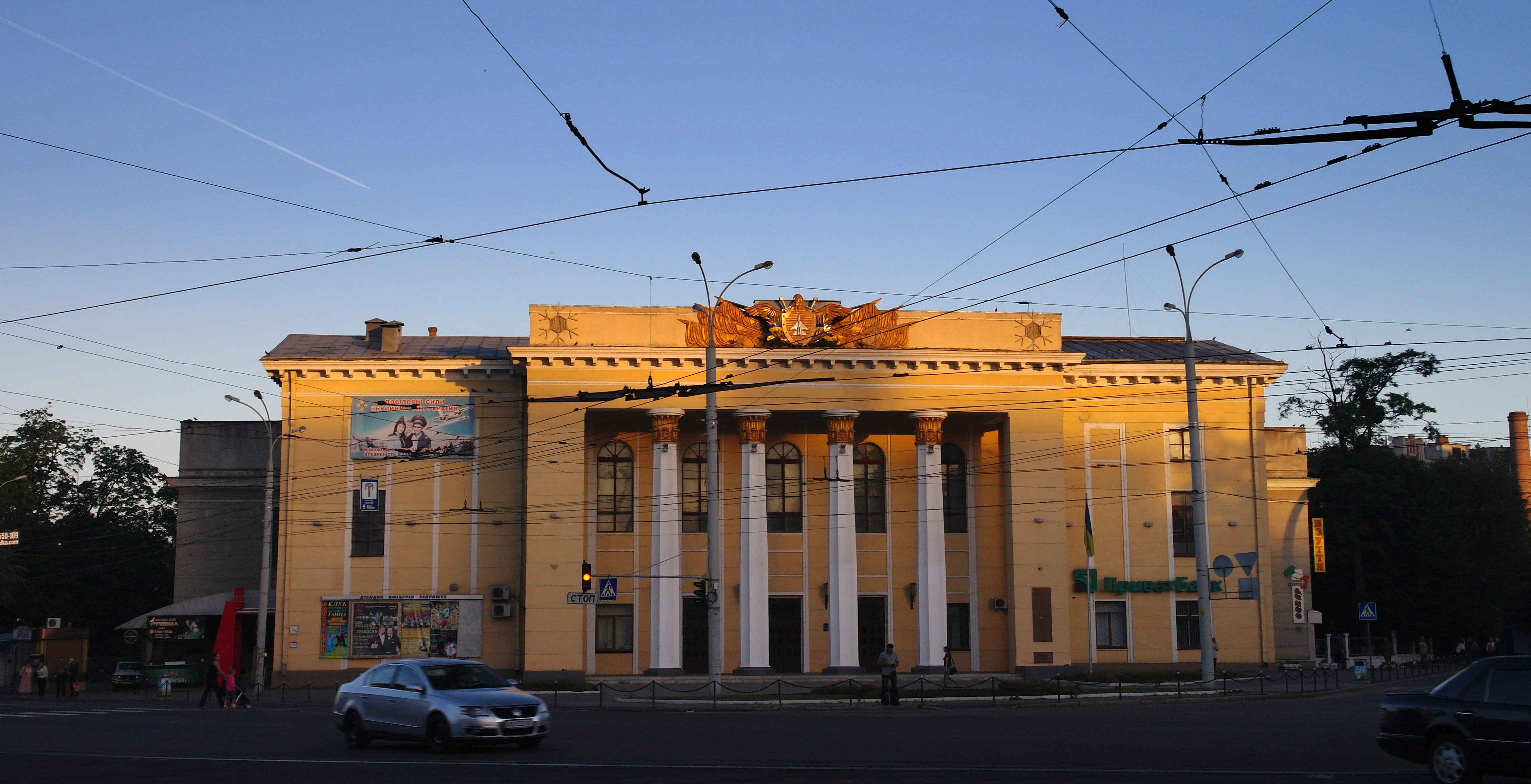 Вінниця, будинок офіцерів